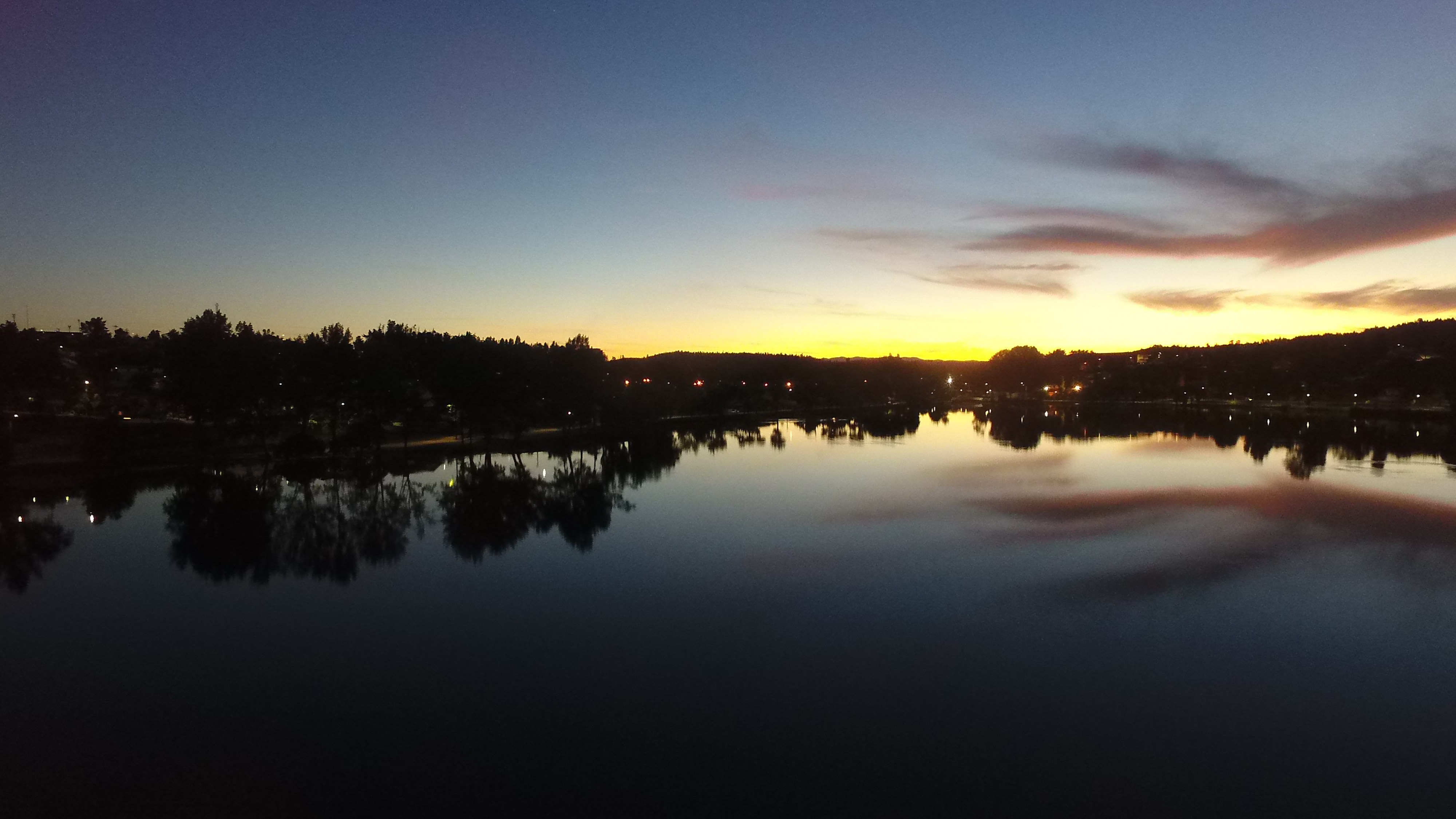 atardecer